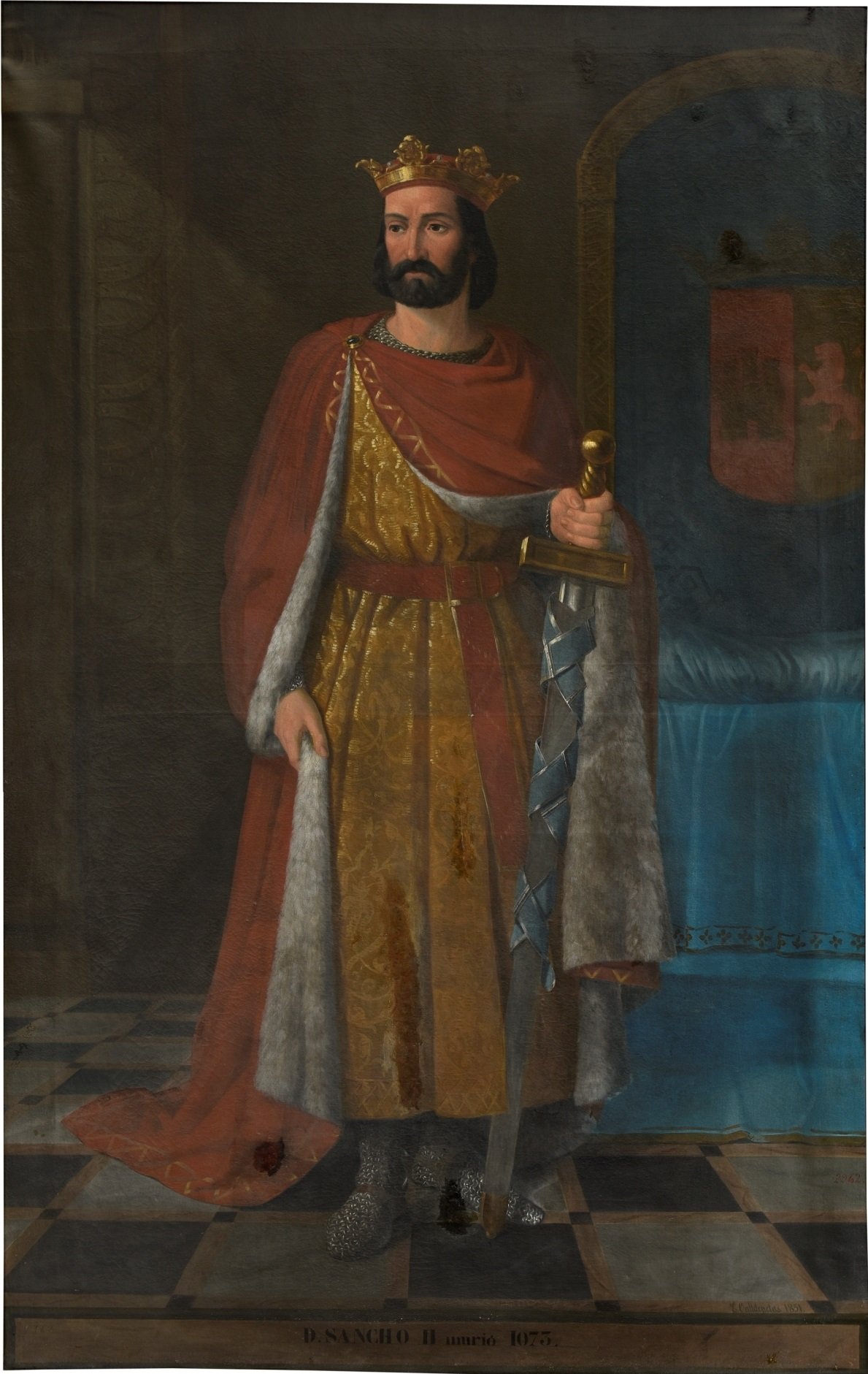 Retrato imaginario del rey Sancho II de Castilla (c.1038-1072). Fue hijo del rey Fernando I de León y de la reina Sancha de León. Consiguió reunificar la herencia de su padre, Fernando I, aunque falleció poco después, en 1072, mientras asediaba la ciudad de Zamora, que pertenecía a su hermana, la infanta Urraca de Zamora. Todos los reinos de Sancho II fueron heredados por su hermano, Alfonso VI de León.